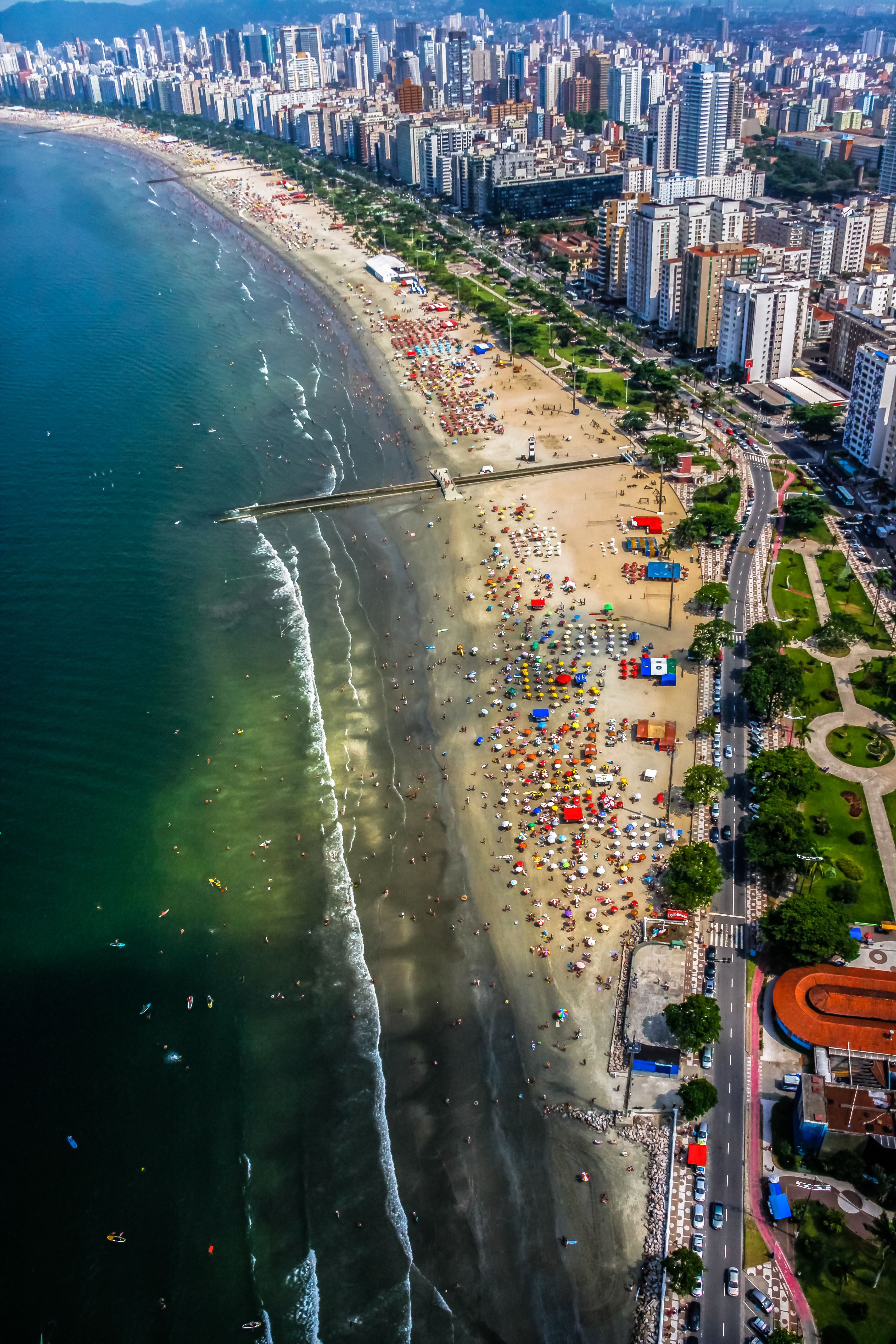 Jardins da Orla